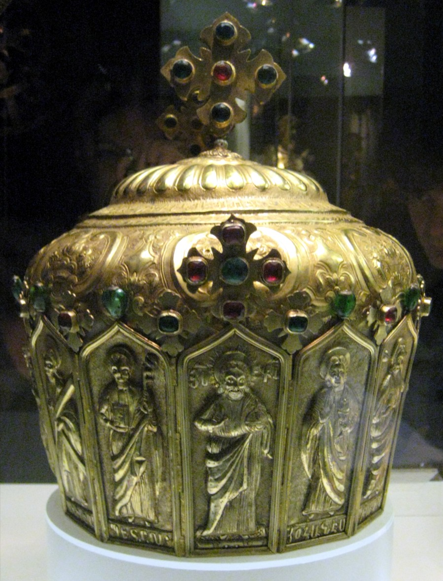 Митра, Армения, 1782. Armenian mitra, 1782